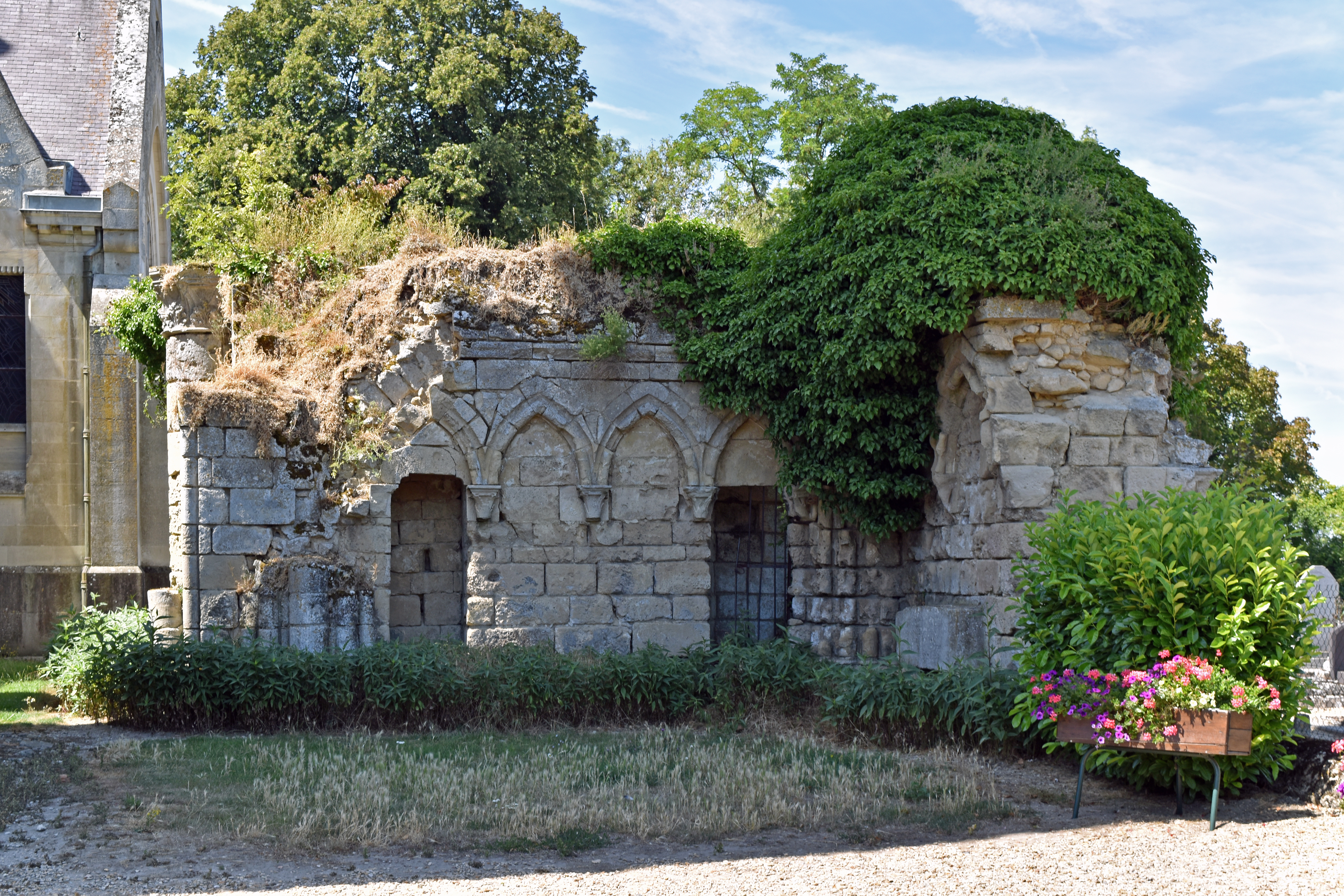 Vestiges de l'église de Mont-Notre-Dame, Aisne, France .